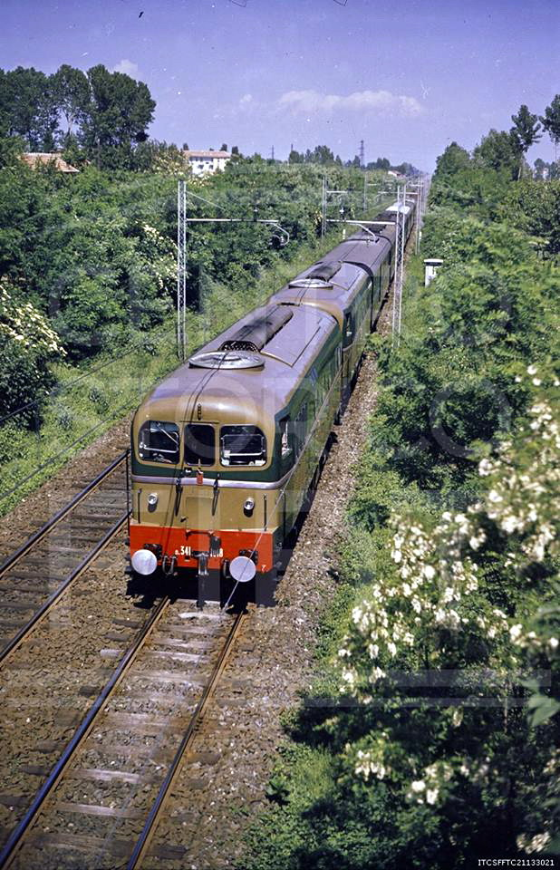 Il treno presidenziale per la regina Elisabetta, dal Centro Documentazione Fiat